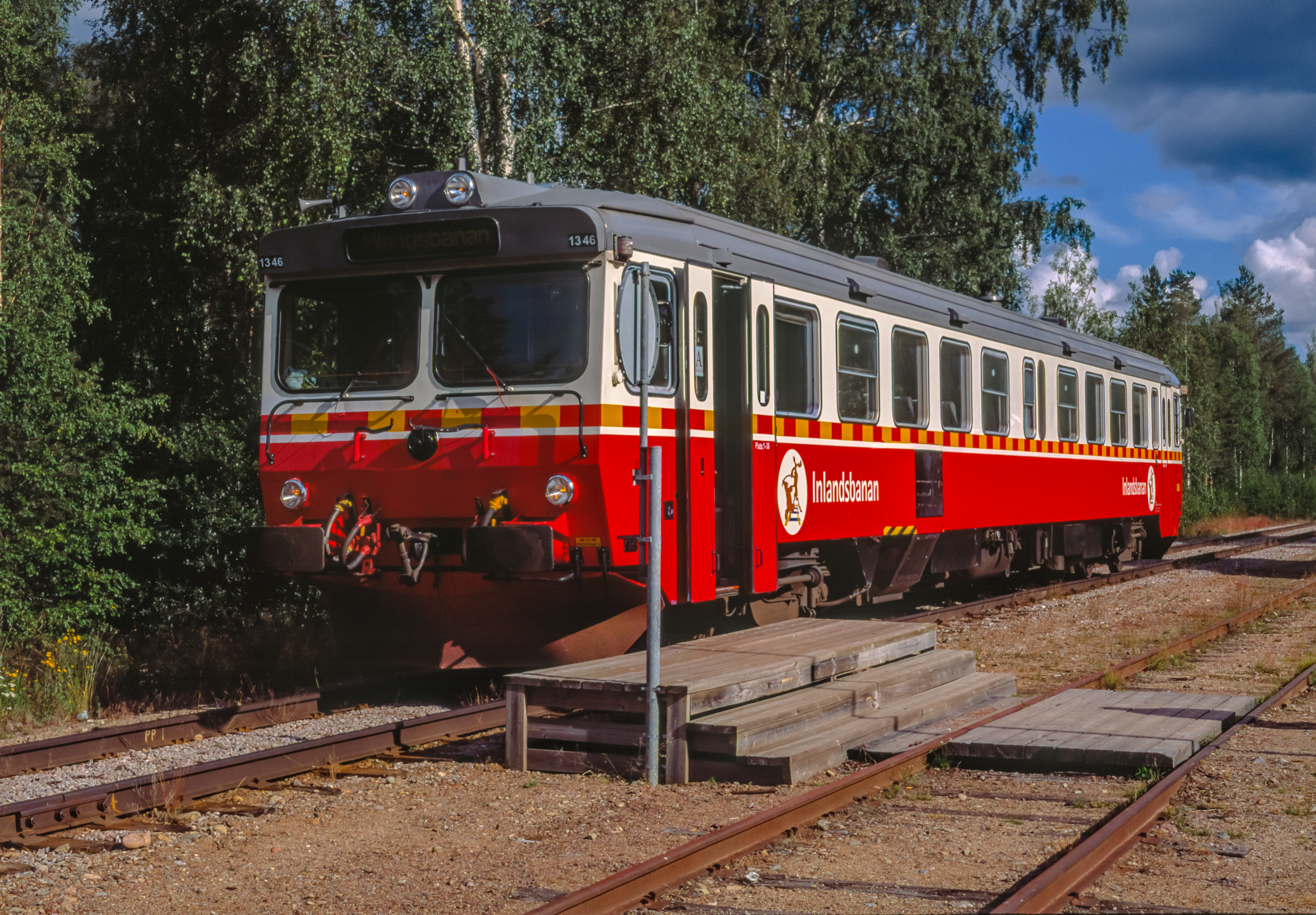 Y1 train at Fågelsjö station (Inlandsbanan).